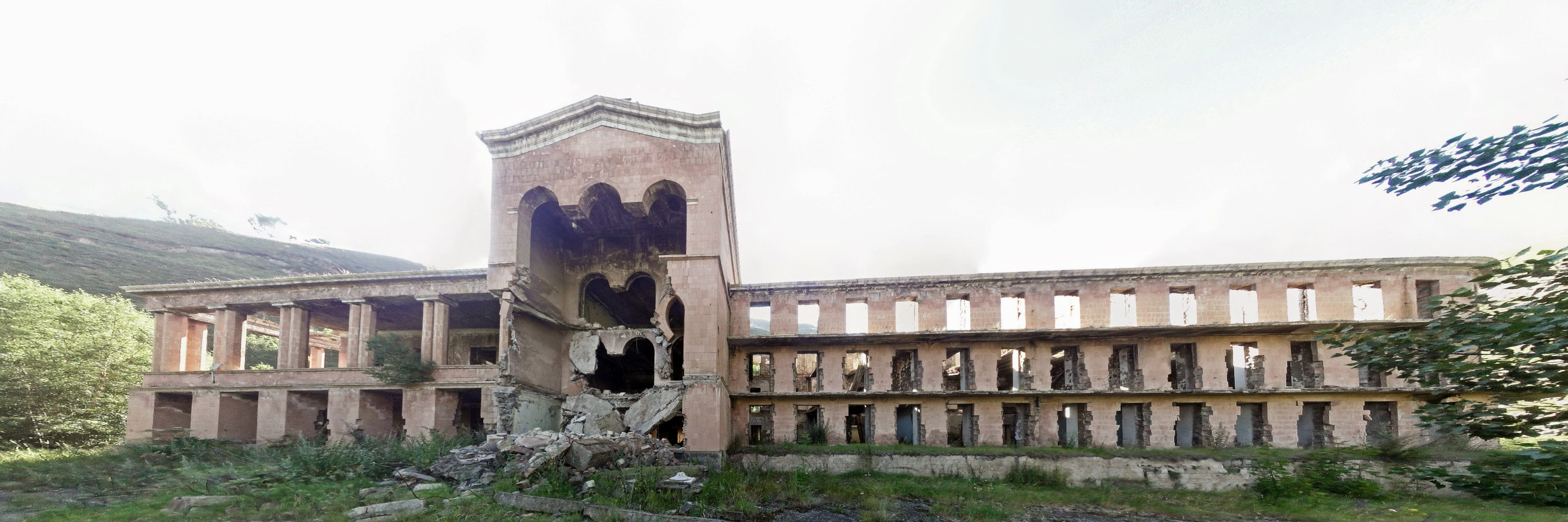 Djermadjur, 2014.07.29